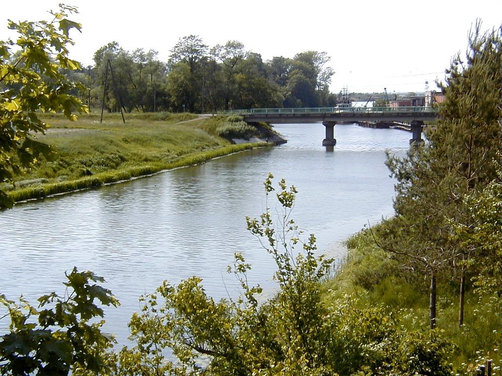 Saka pie Pāvilostas 2000-06-11